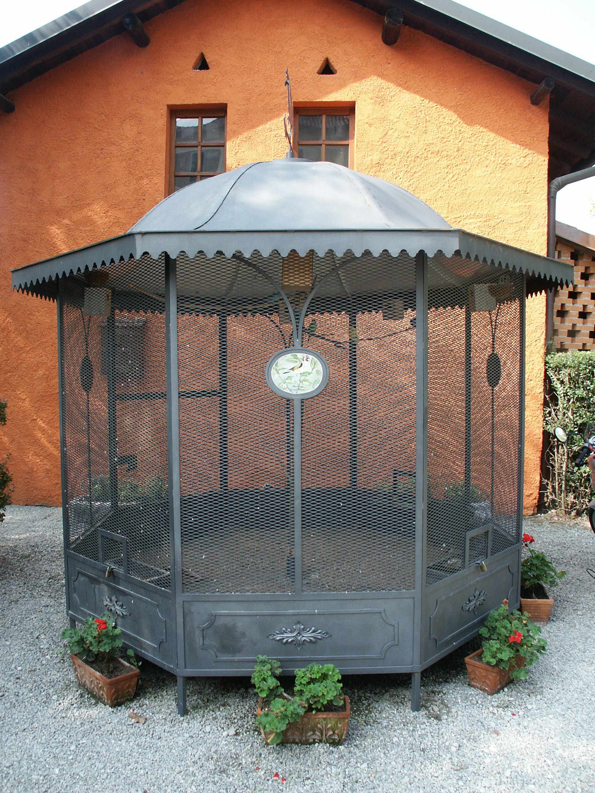 Voliera di Cascina Lodovica a Oreno di Vimercate. Source: Photo by Frieda